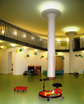 Pestalozzi-Stiftung Hamburg day care centre in the Bethesdastraße. This is a photograph of an architectural monument.